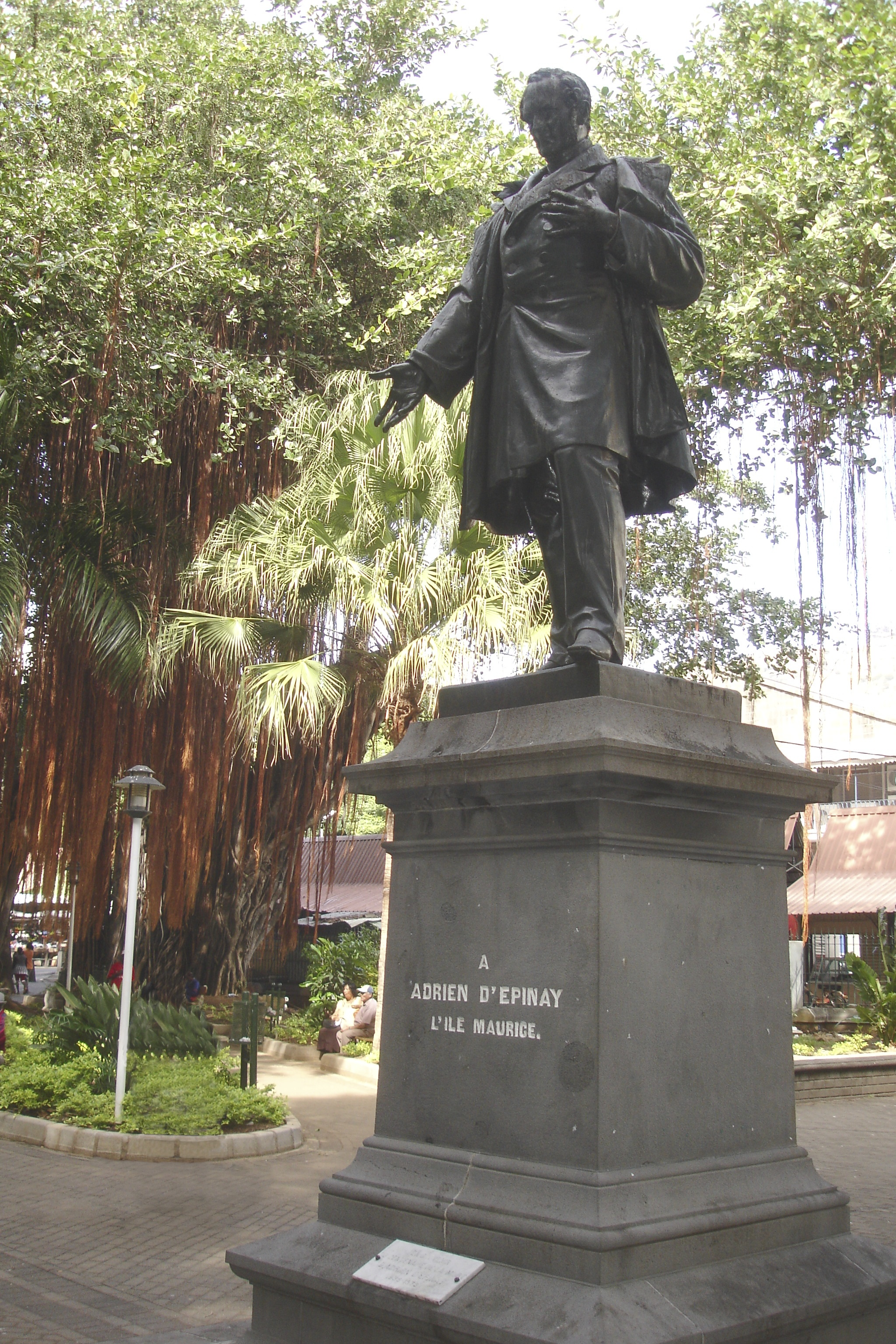 Statue d'Adrien d'Épinay au Jardin de la Compagnie à Port-Louis-Ile Maurice. Oeuvre du sculpteur Prosper d'Épinay (1863-1864).